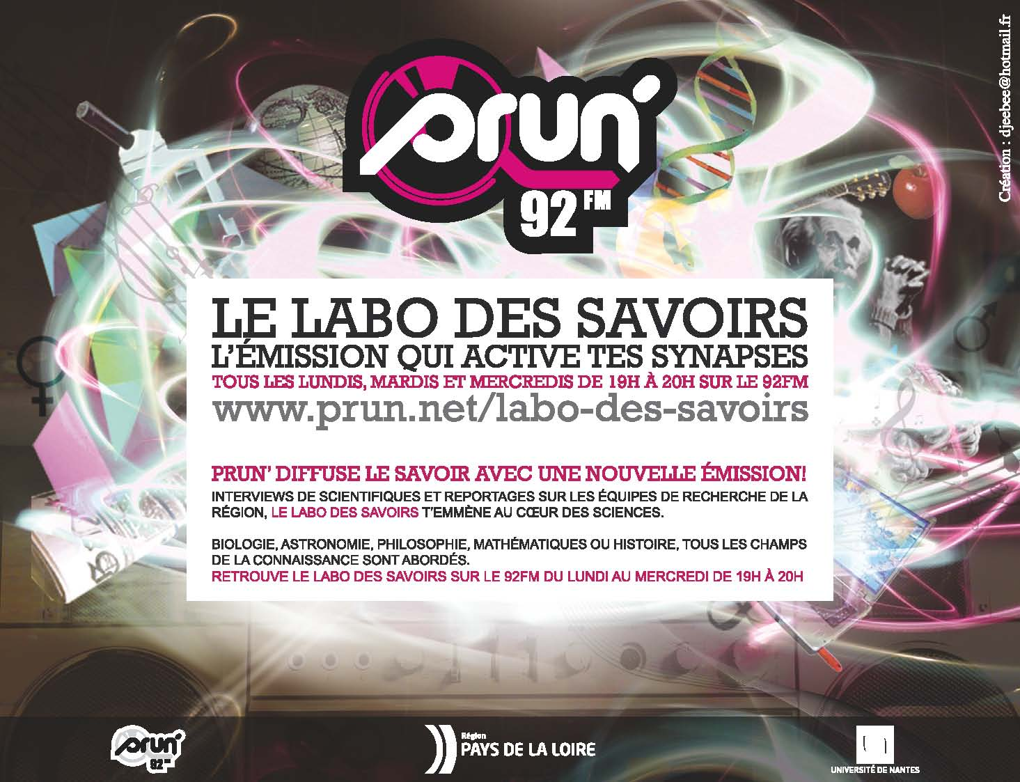 Visuel de l'émission de radio : Le Labo des Savoirs